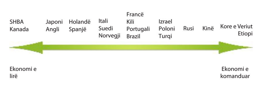 Vende të ndryshme në boshtin e sistemeve ekonomike